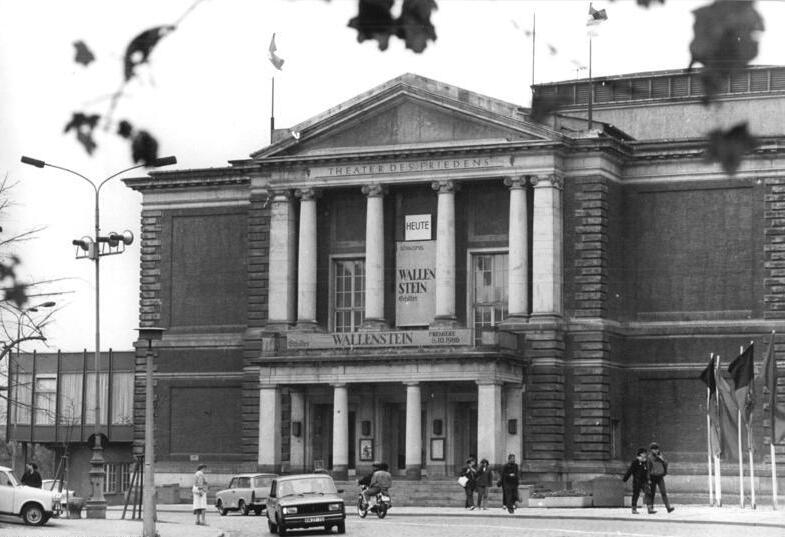 Halle, Landestheater ADN-ZB Lehmann 8.10.86 Halle. 100 Jahre Stadttheater. Das Hallenser Landestheater am Universitätsring wurde von 100 Jahren als Stadttheater eröffnet und trägt seit 35 Jahren den Namen "Theater des Friedens". - siehe auch Motiv 1986-1008-33n